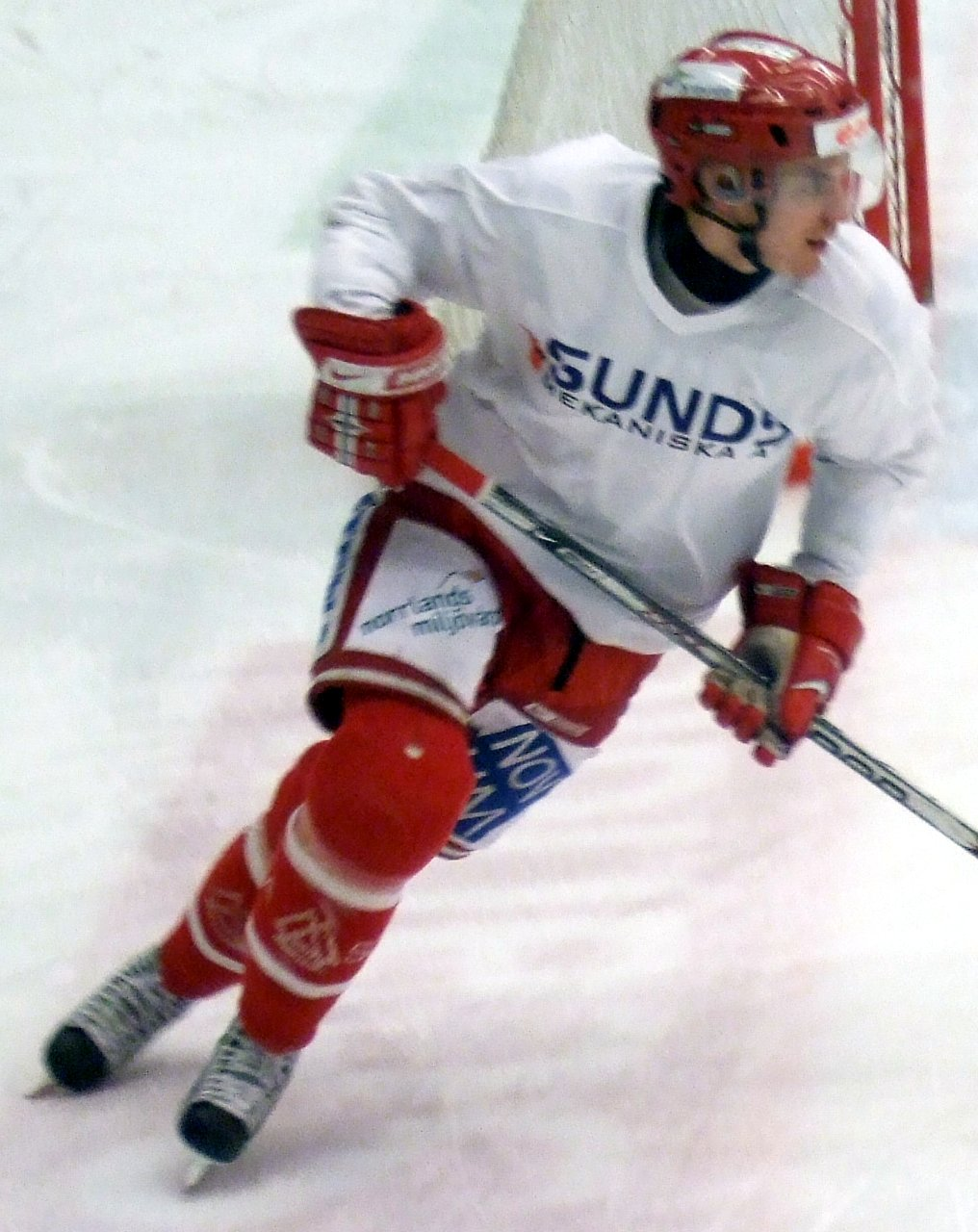 Ice hockey player Fredrik Hynning of Timrå IK in E.ON Arena, Timrå, Sweden